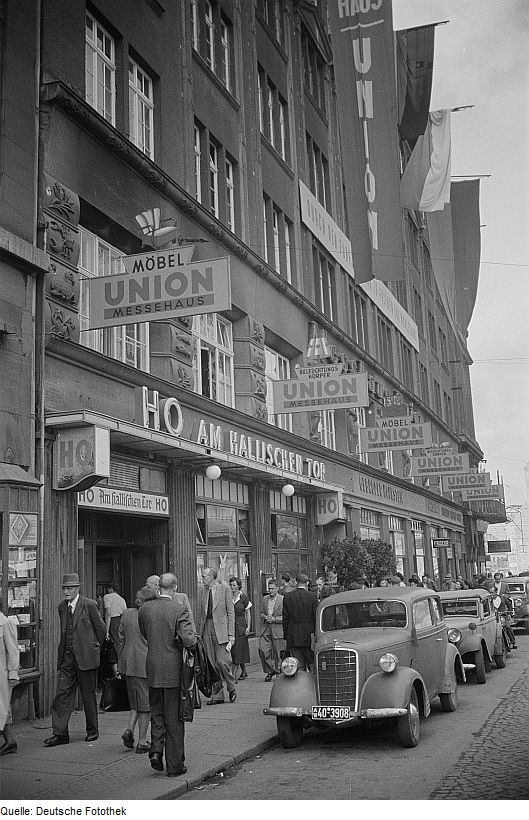 Original image description from the Deutsche FotothekVorderansicht des Messehauses Union während des Messebetriebs